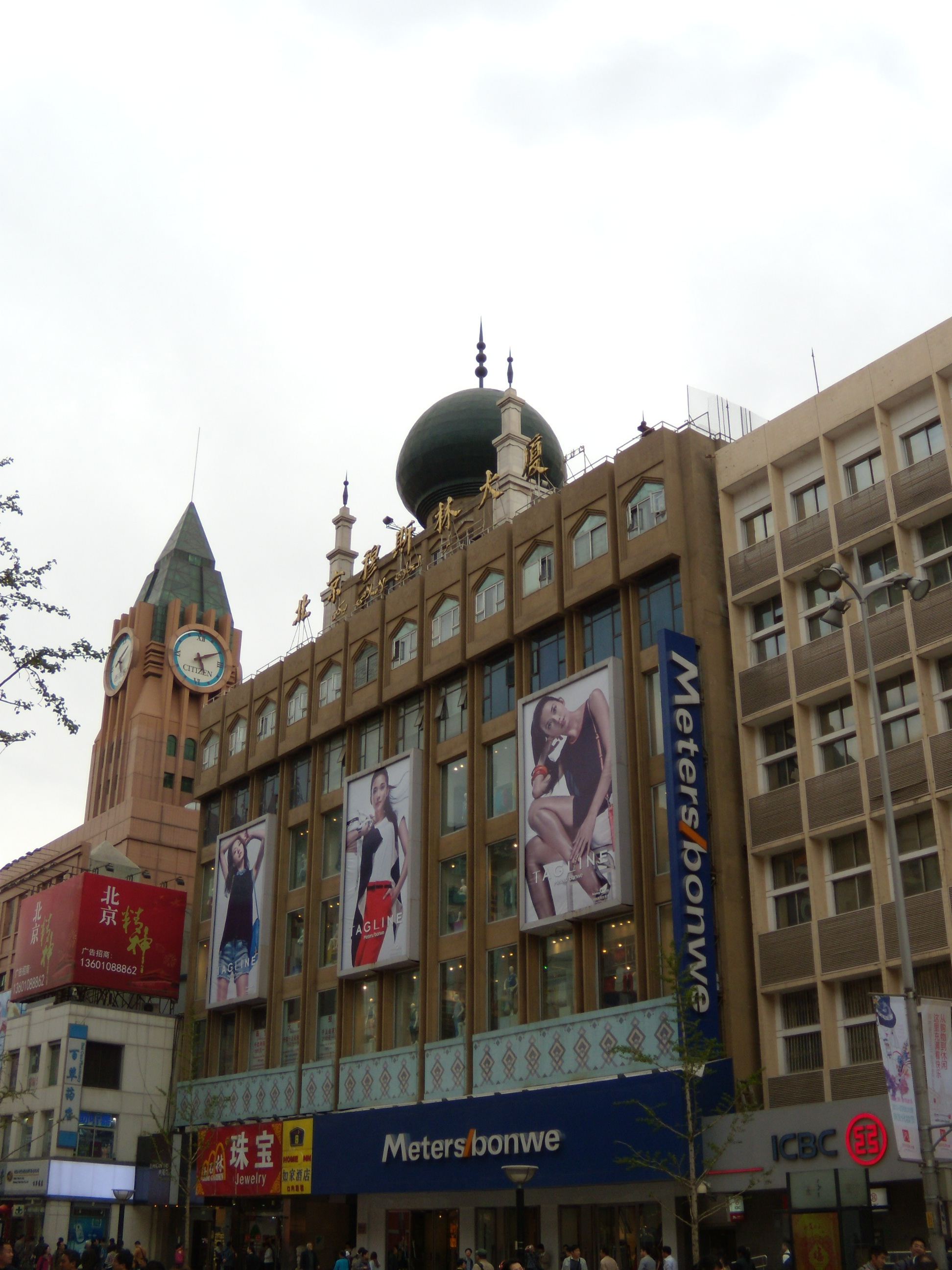 北京穆斯林大厦，位于王府井大街